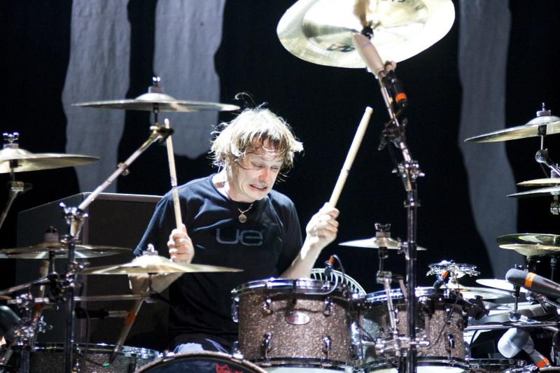 Korn Live @ Credicard Hall - 21/04/2010 - São Paulo, Brasil É proibida a cópia ou reprodução deste material sem a autorização do autor. Por favor, não publique nada daqui sem o devido crédito. Fotógrafo: Alexandre Cardoso